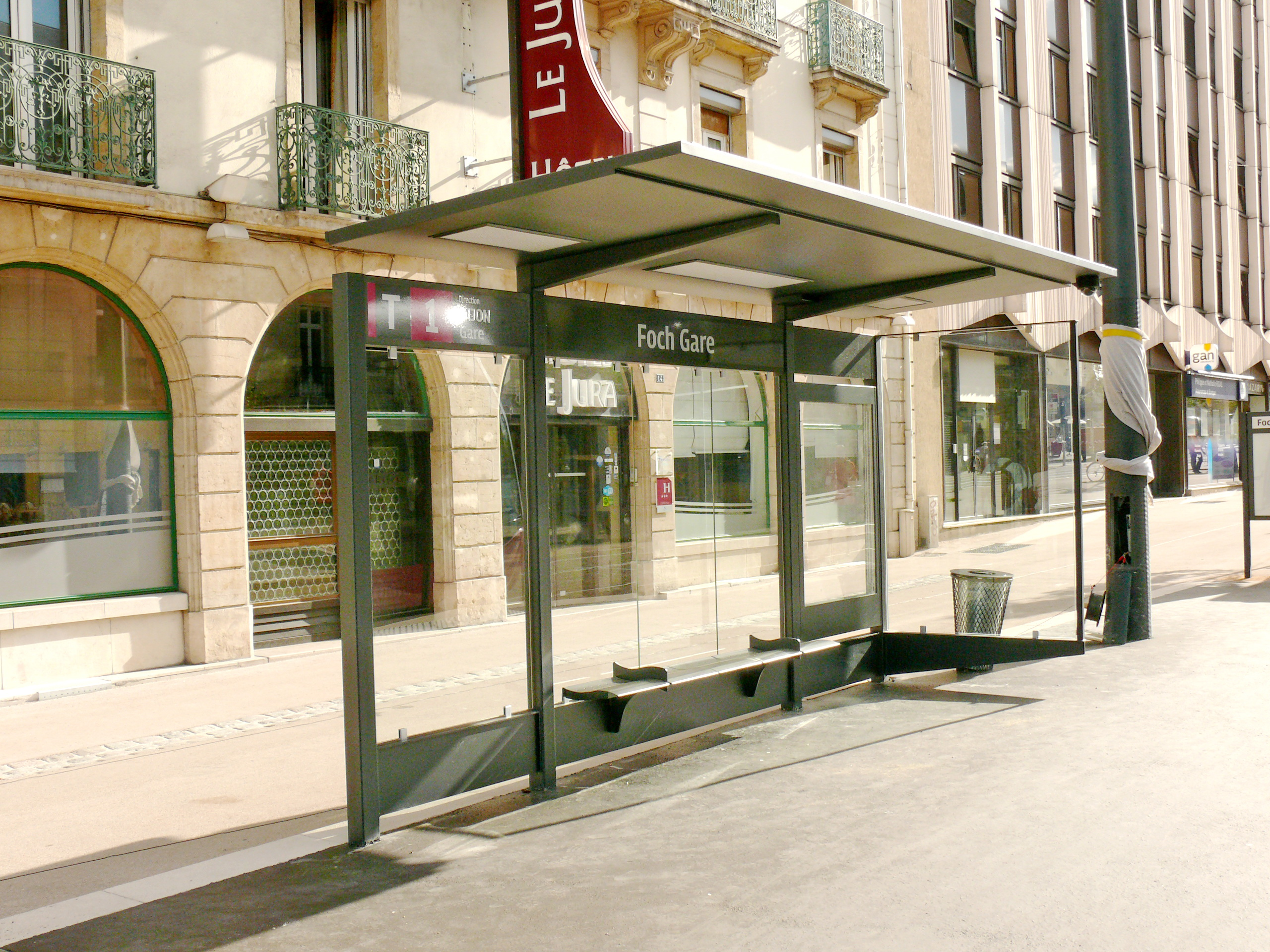 Aubette de la station Foch-Gare du Tramway de Dijon. On y distingue le cône de la vidéo-surveillance et le banc interdisant de s'y alonger